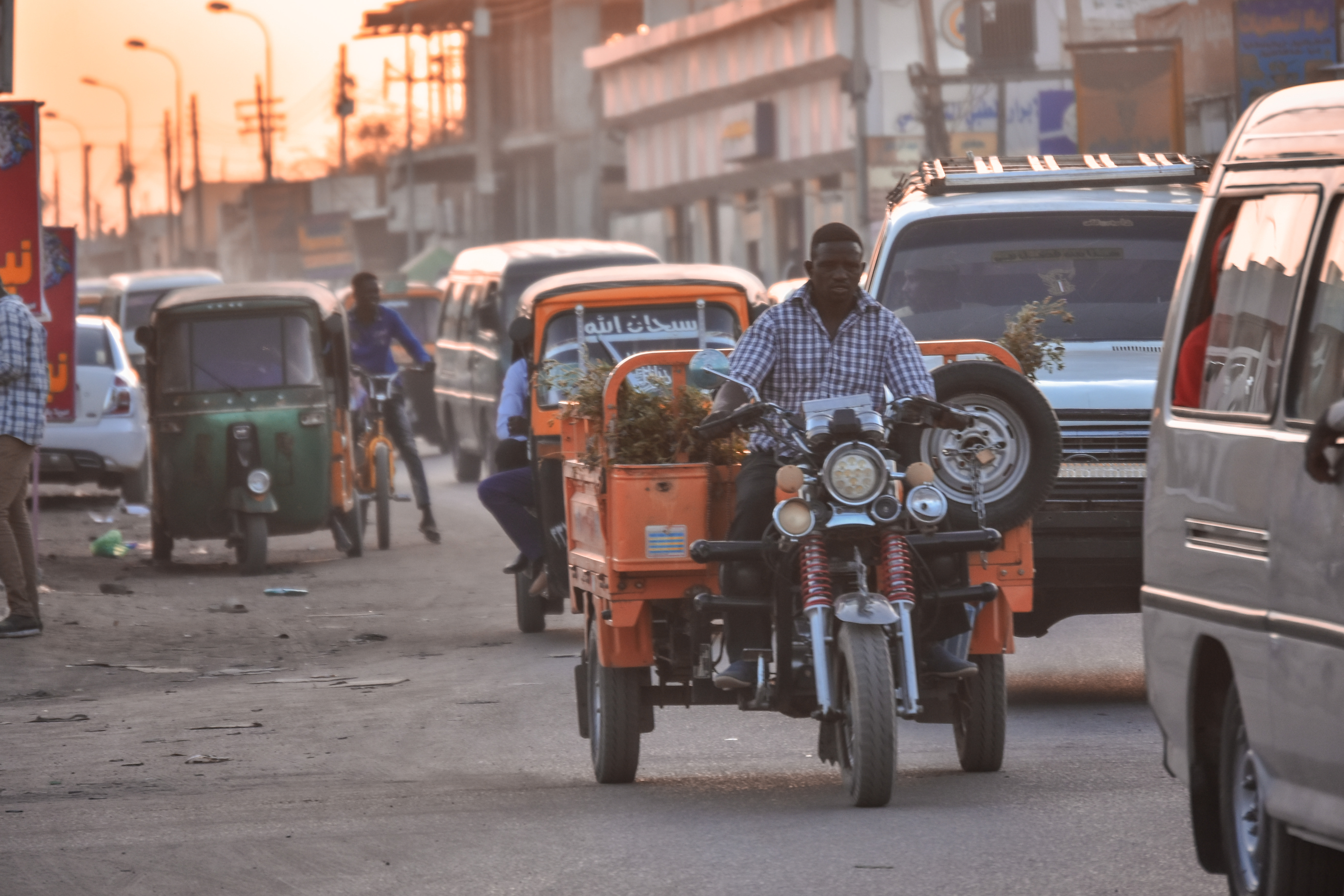 توك توك This is an image with the theme "Africa on the Move or Transport" from: Sudan